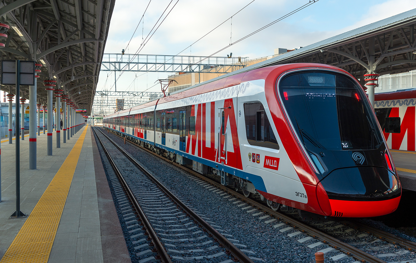 Электропоезд ЭГ2Тв-033 на Белорусском вокзале (платформа 7)